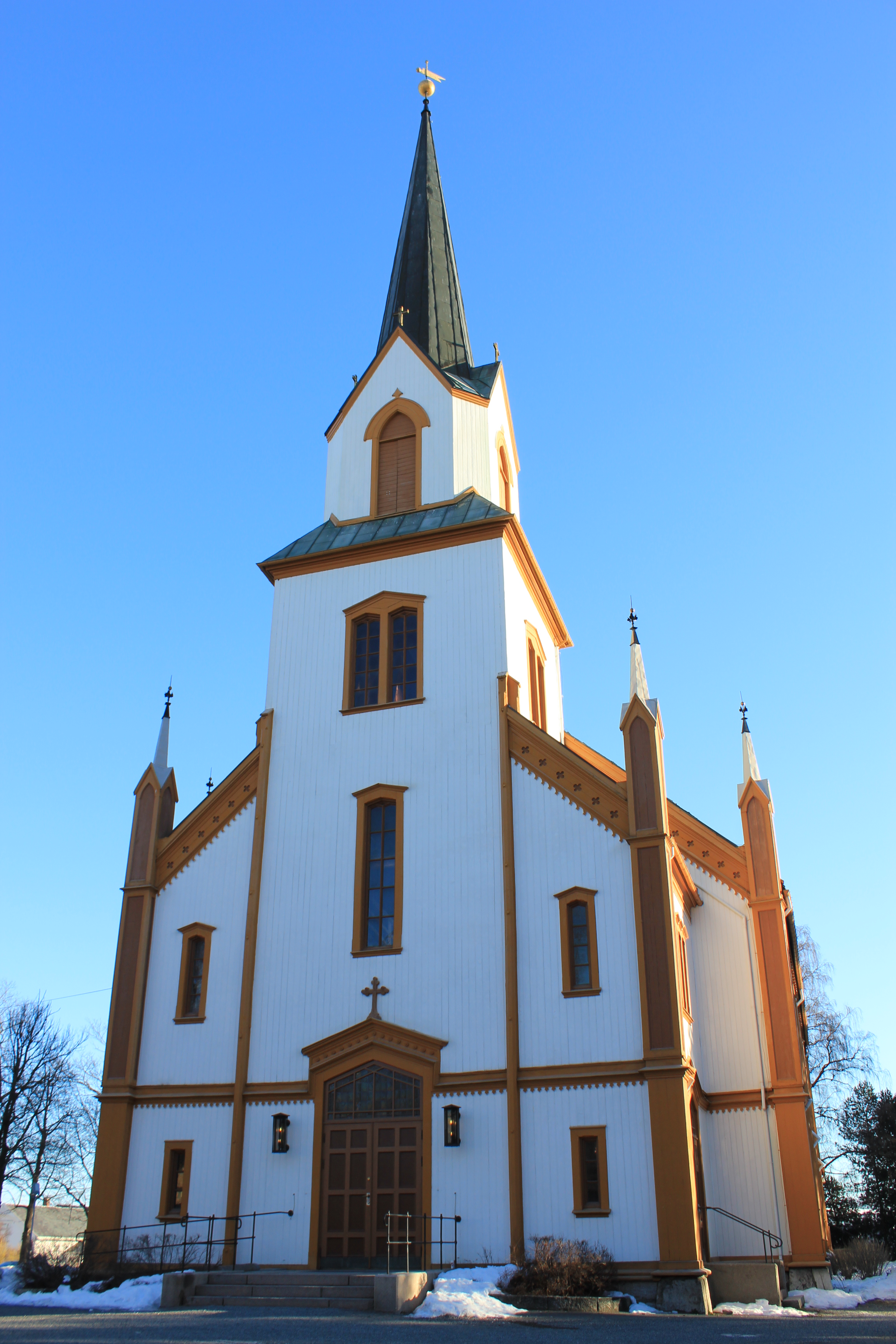 Gjøvik kirke.